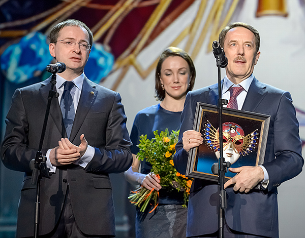 Фестиваль «Золотая маска» 2015 года